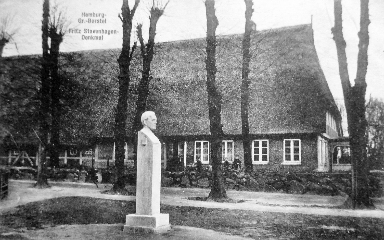 Das Fritz-Stavenhagen-Denkmal in Hamburg-Groß Borstel. - Ob es noch steht?